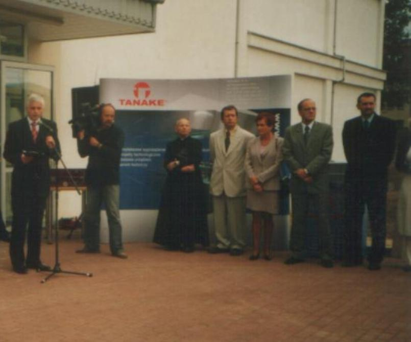 Szpital, 2005 r. Były dyrektor dr Jerzy Sowa (czwarty od lewej)